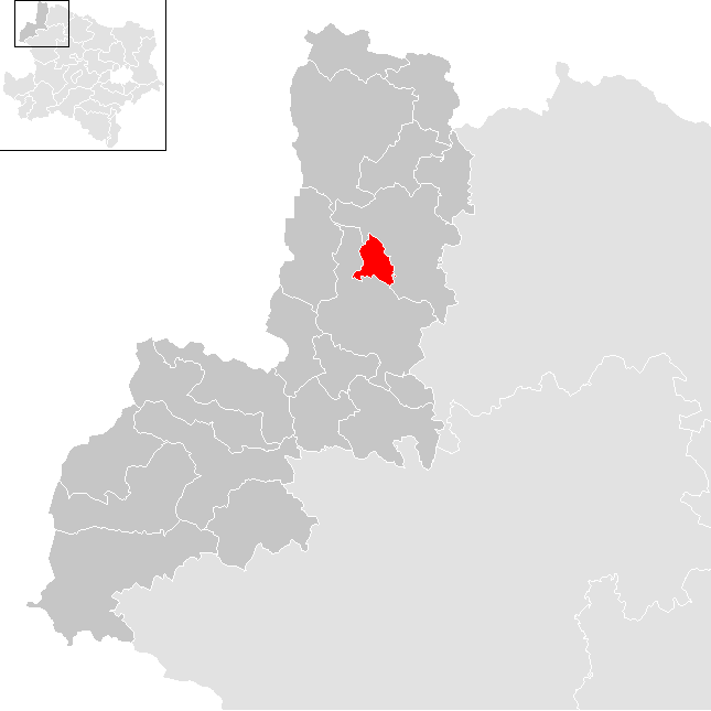 Bezirk Gmünd